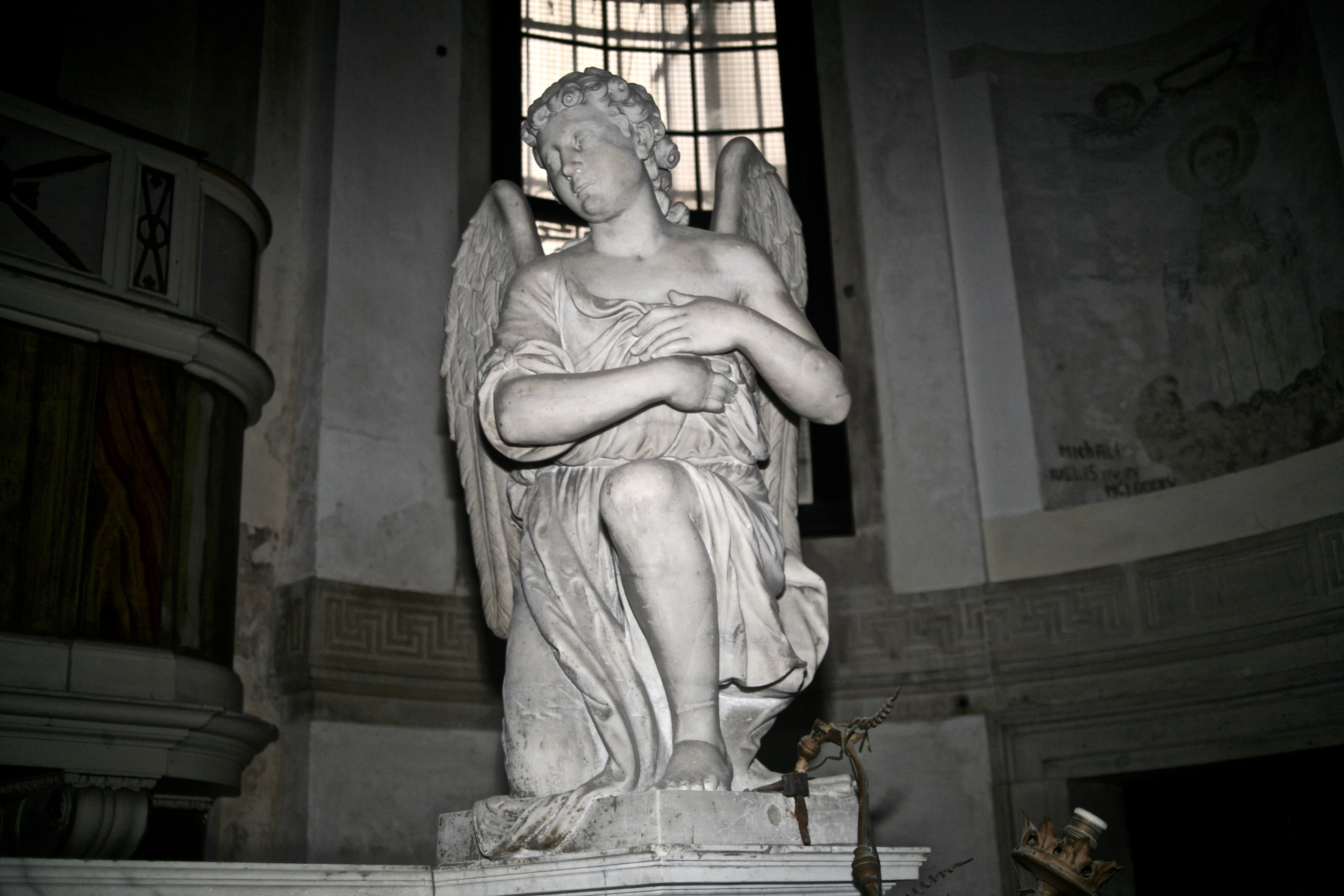 Si tratta del particolare di uno degli angeli all'interno della Chiesa